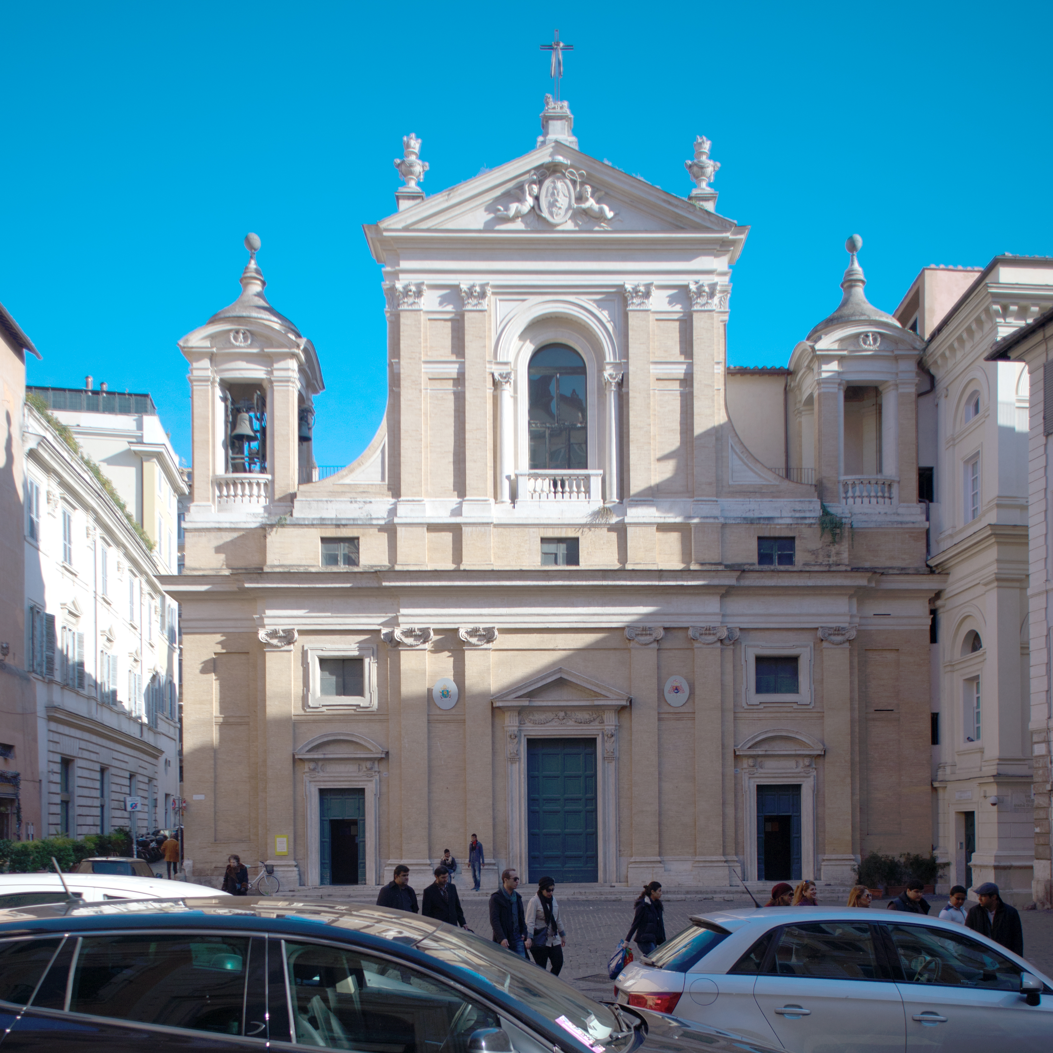 Facciata della chiesa di Santa Maria in Aquiro